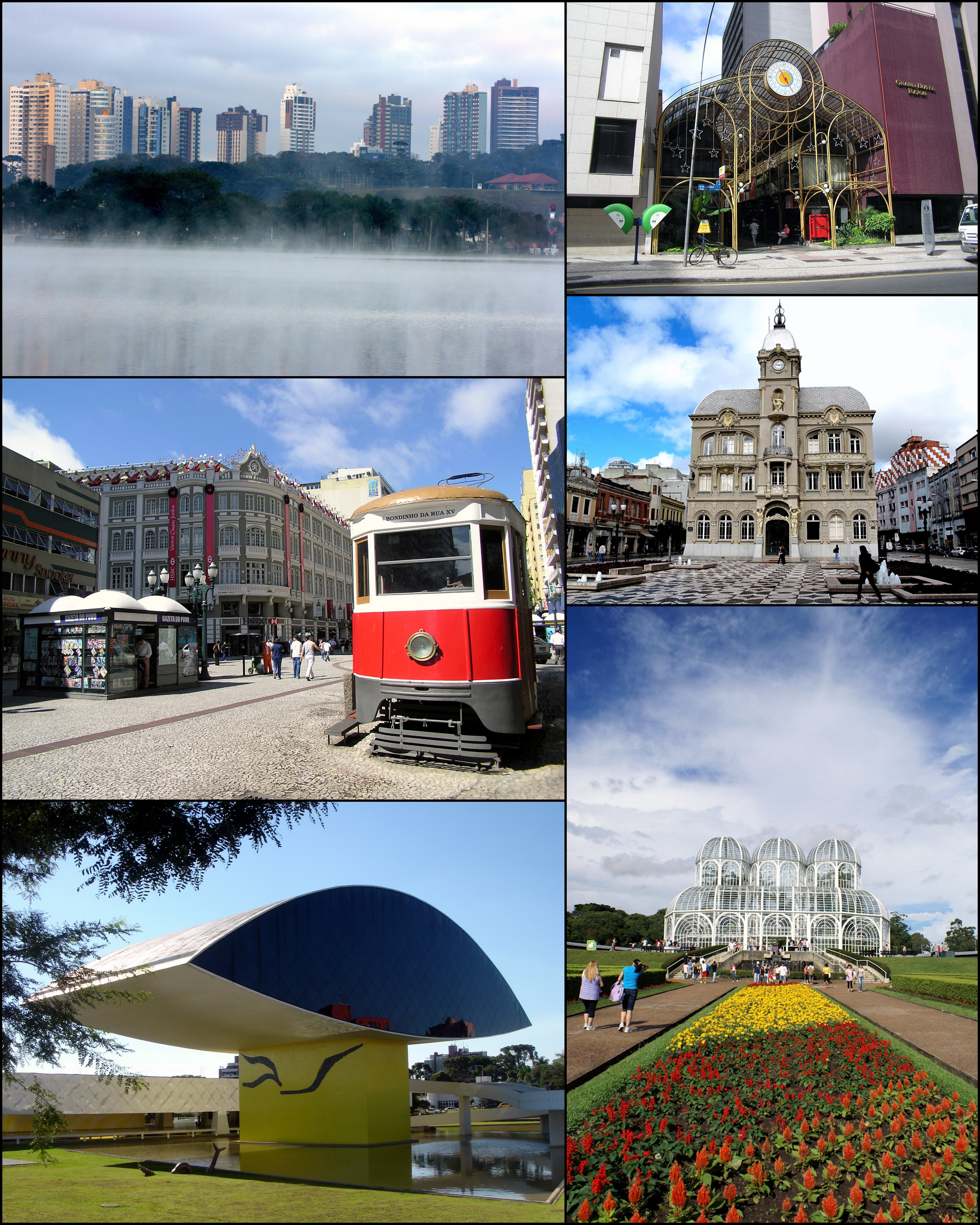 Montage fotográfico de Curitibp, capital del estado de Paraná.